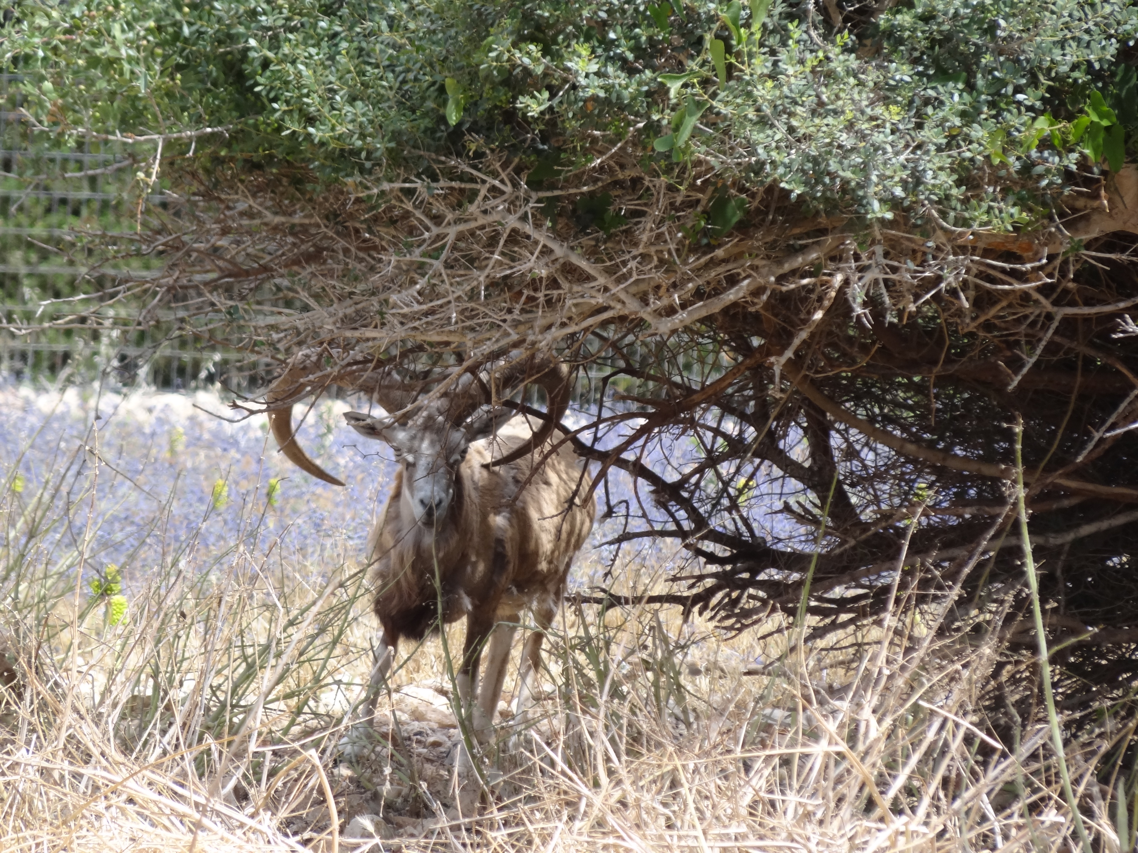 Category:Carmel Hai-Bar Nature Reserve, Animal Nature Reserve. Mount Carmel Israel חי-בר כרמל משמש כמקום רבייה לבעלי חיים שחיו בכרמל ונעלמו. ביניהם, אייל הכרמל, יחמור פרסי, נשר, עיטם זנב לבן, צבי ארצישראלי, עז בר וכבש בר כבש הבר האירני